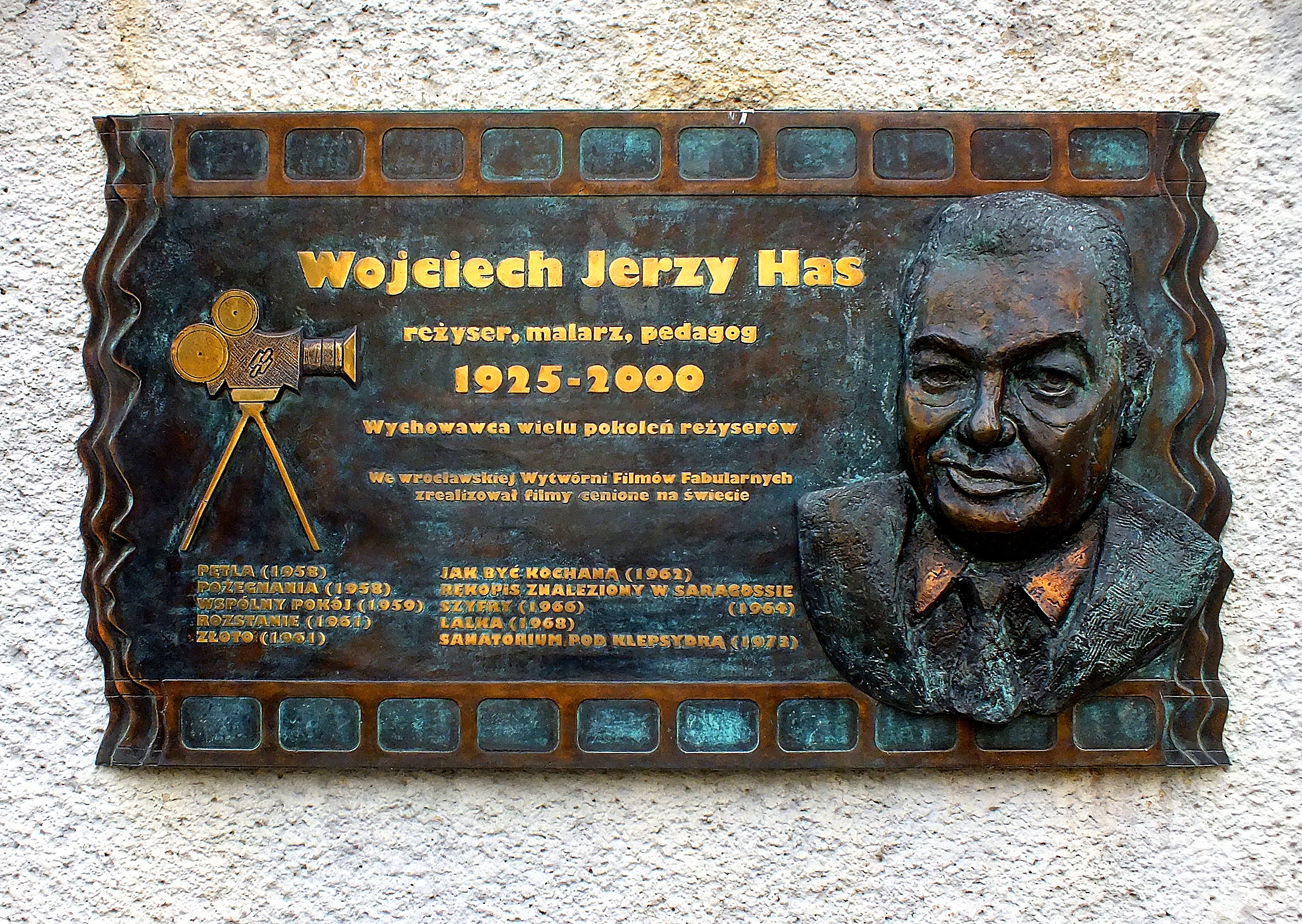 Wrocław - tablica pamiątkowa - Wojciech Jerzy Has